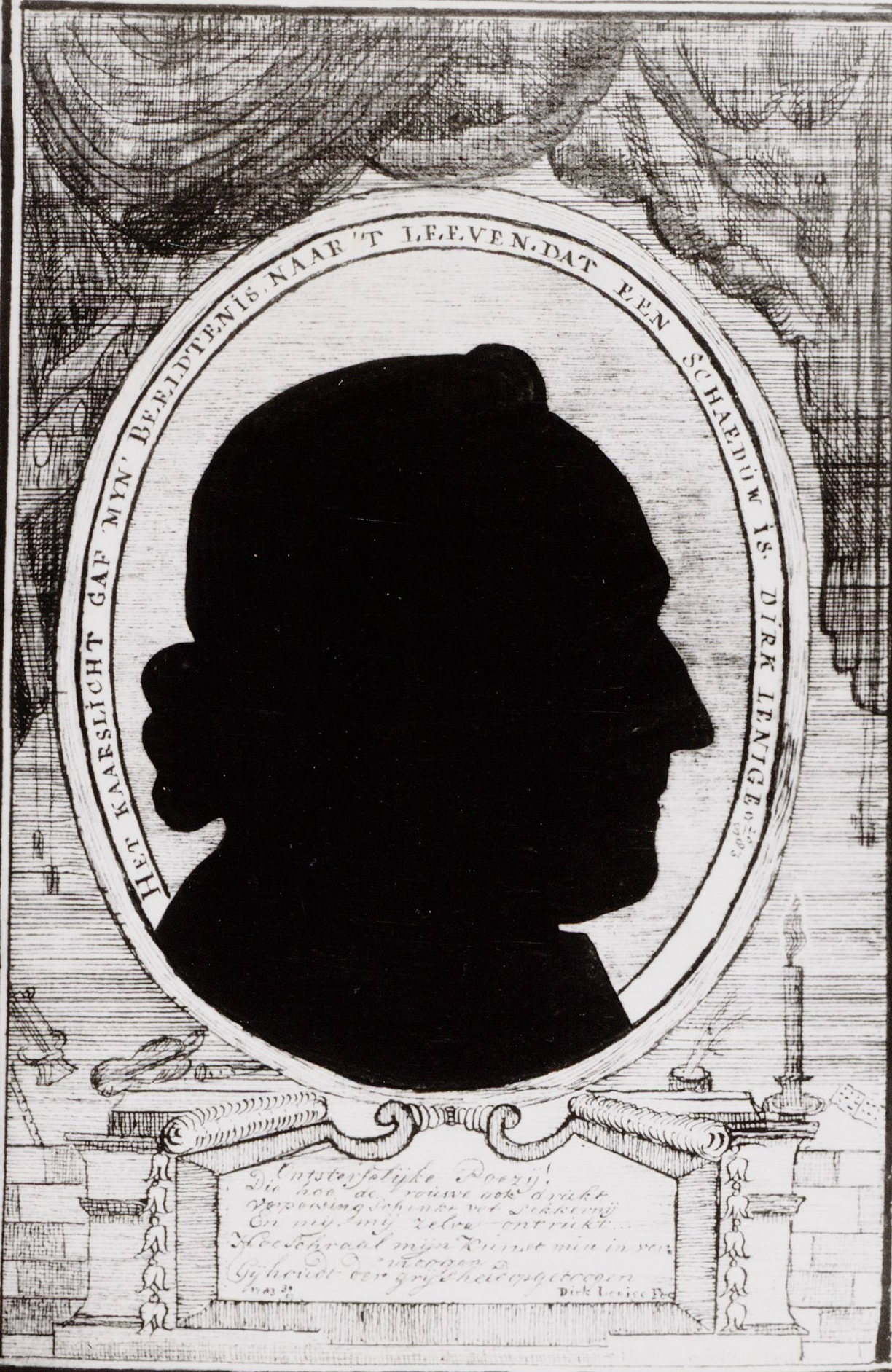 Schaduwportret van Dirk Lenige (1722-1798)